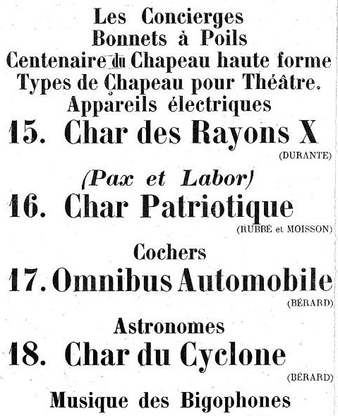 Supplément au Figaro, programme officiel des fêtes du Bœuf gras en 1897, détail.